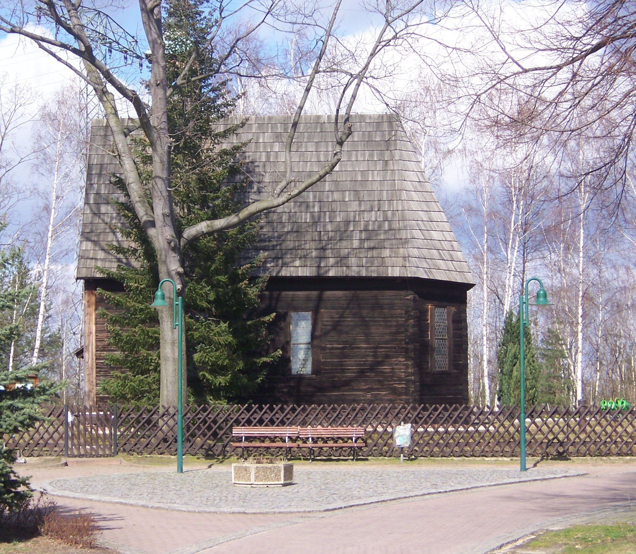 Straßenseite der Schrotholzkirche in Sprey Map: 51° 25′ 33″ N, 14° 32′ 15″ E